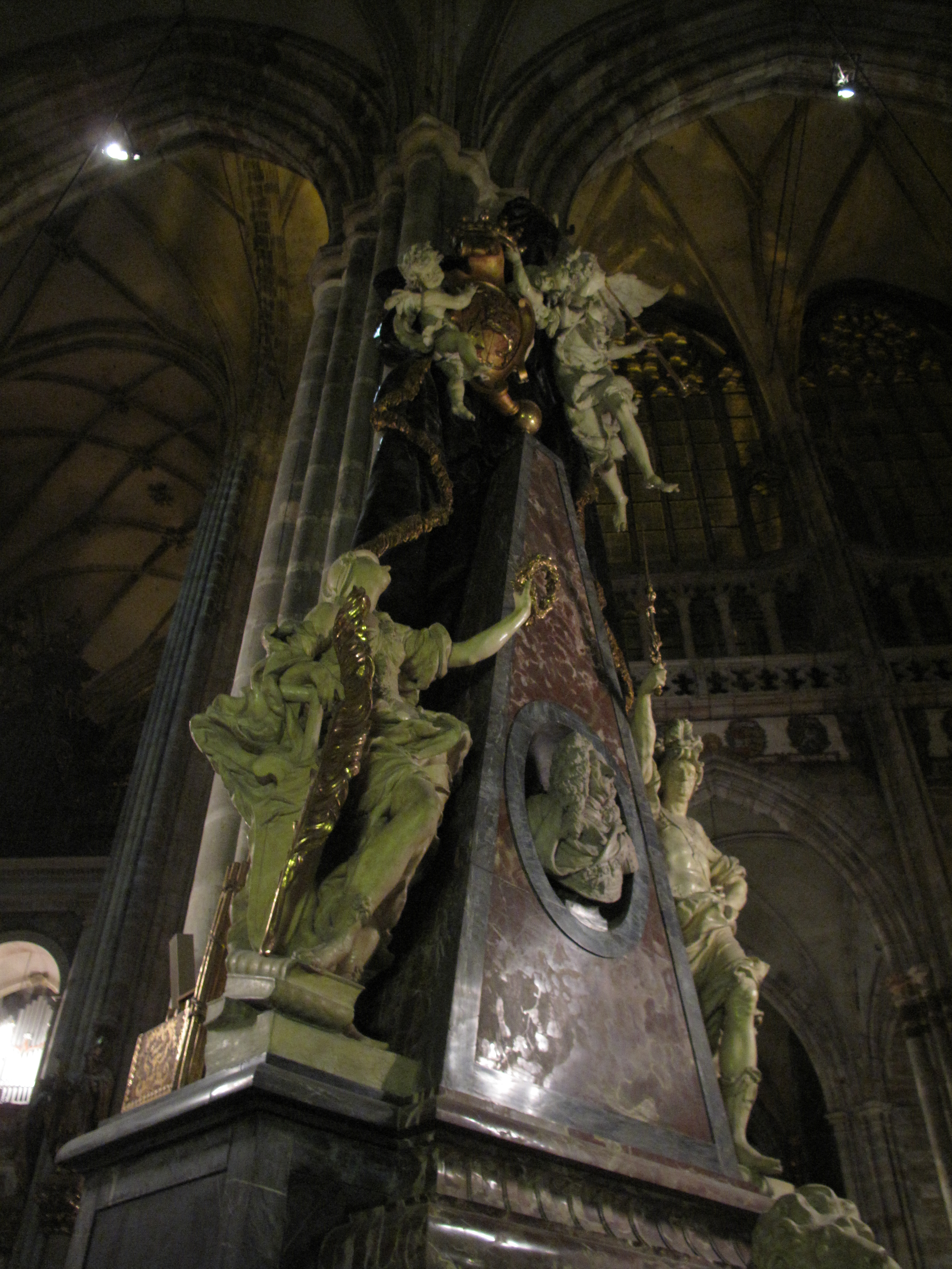 Chrám svatého Víta